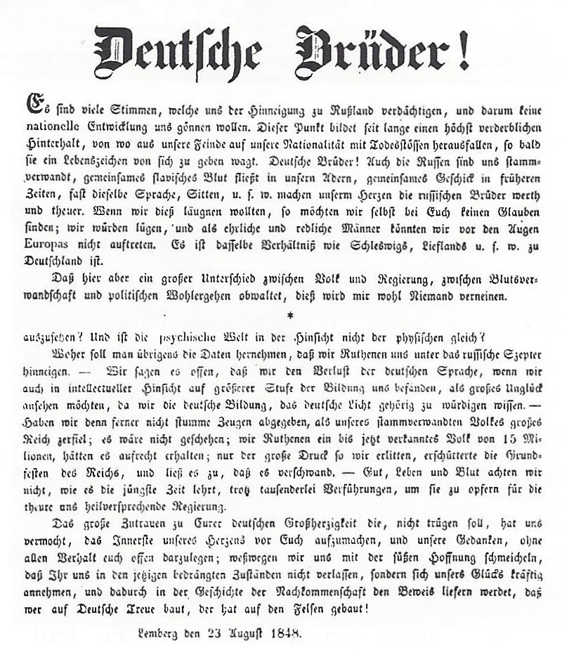 Aufruf der Ruthenen in Lemberg